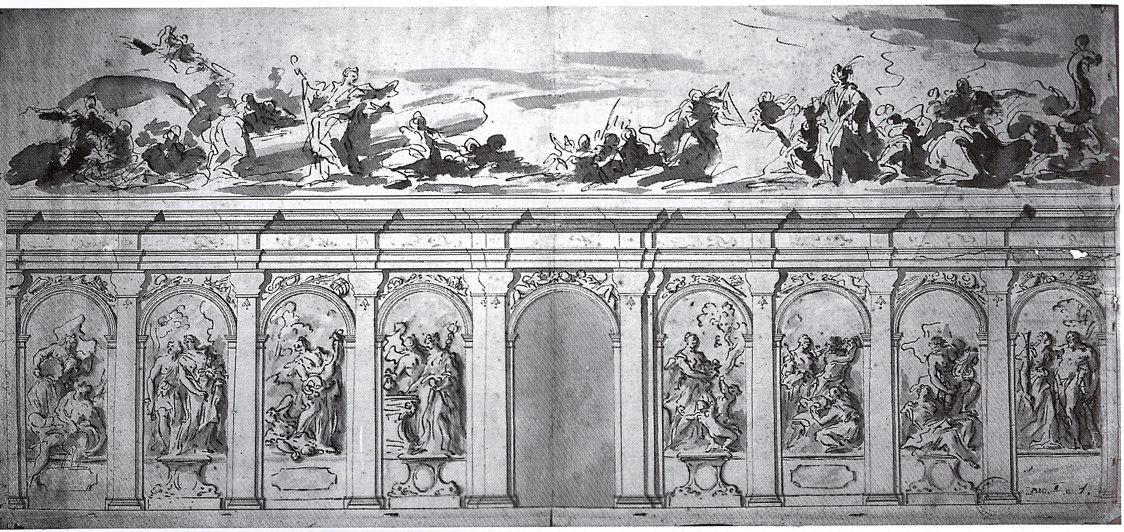 Dresden, Zwinger, Deutscher Pavillon, Deckenfresco von Giovanni Antonio Pellegrini, gemalt 1725 , zerstört 1849, The Four Continents, Dresden, Institut für Denkmalpflege.jpg